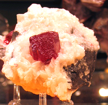 Fotografía de Pablo Alberto Salguero Quiles